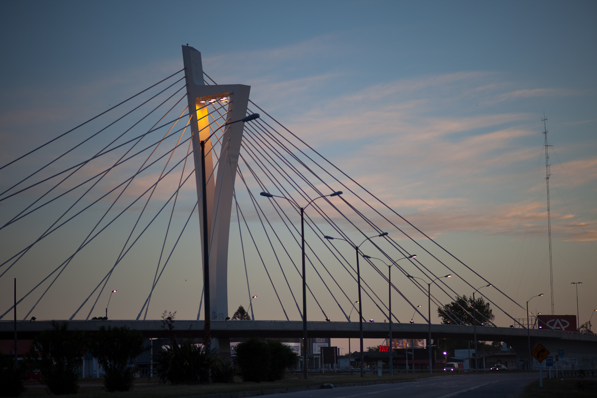 146 metros de largo, 44.5 metros de altura y 52 pilotes tensados. Diseño del ingeniero español Julio Martínez Calzón. Avenida de las Américas, Barra de Carrasco, Paso de Carrasco, Canelones, Uruguay. Camera: Canon EOS 5D Mark II 0 ISO: 50